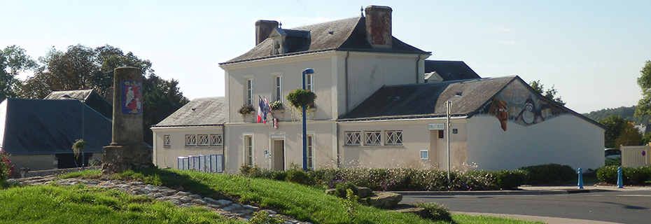 Vue de la mairie de Saint-Roch depuis le sud de la place de la Mairie avec en premier plan une borne gallo romaine retrouvée sur le territoire communal.